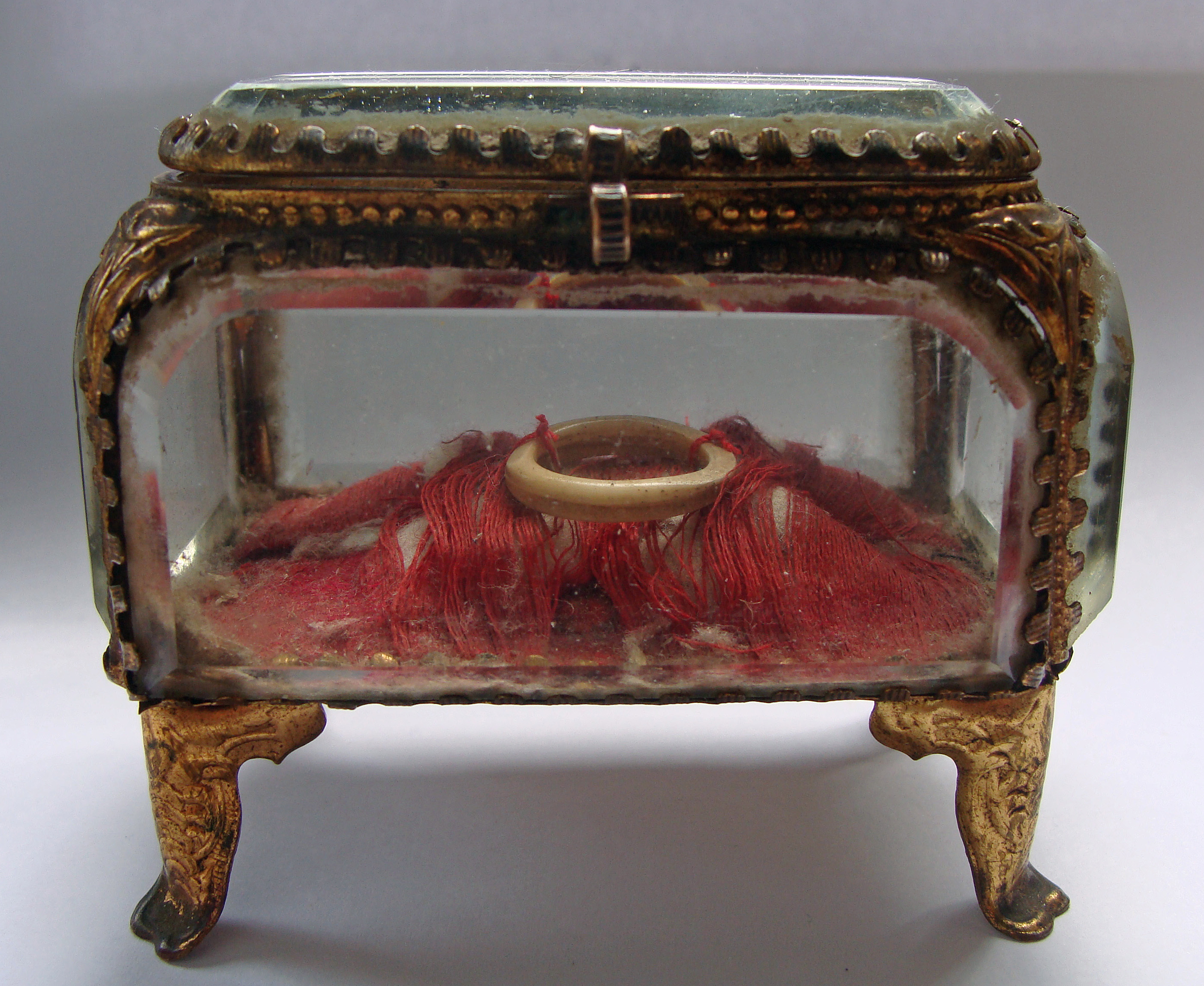 Reliquaire contenant la bague en ivoire de Sainte Alice de Werd, appelée aussi Alice de Forbach.